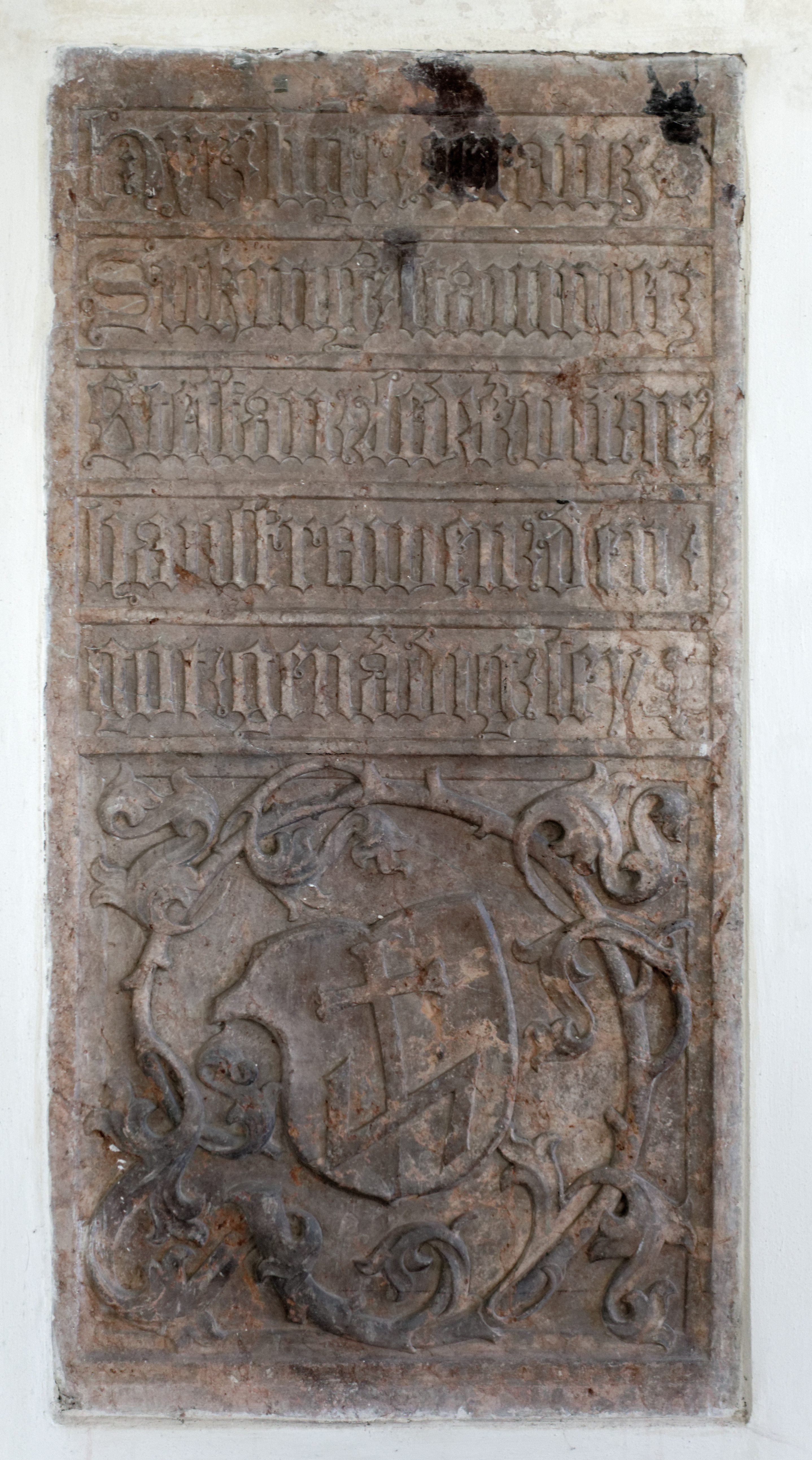 Grabstein von Franz Sickinger, von ihm selbst geschaffen in St. Jakob, Burghausen